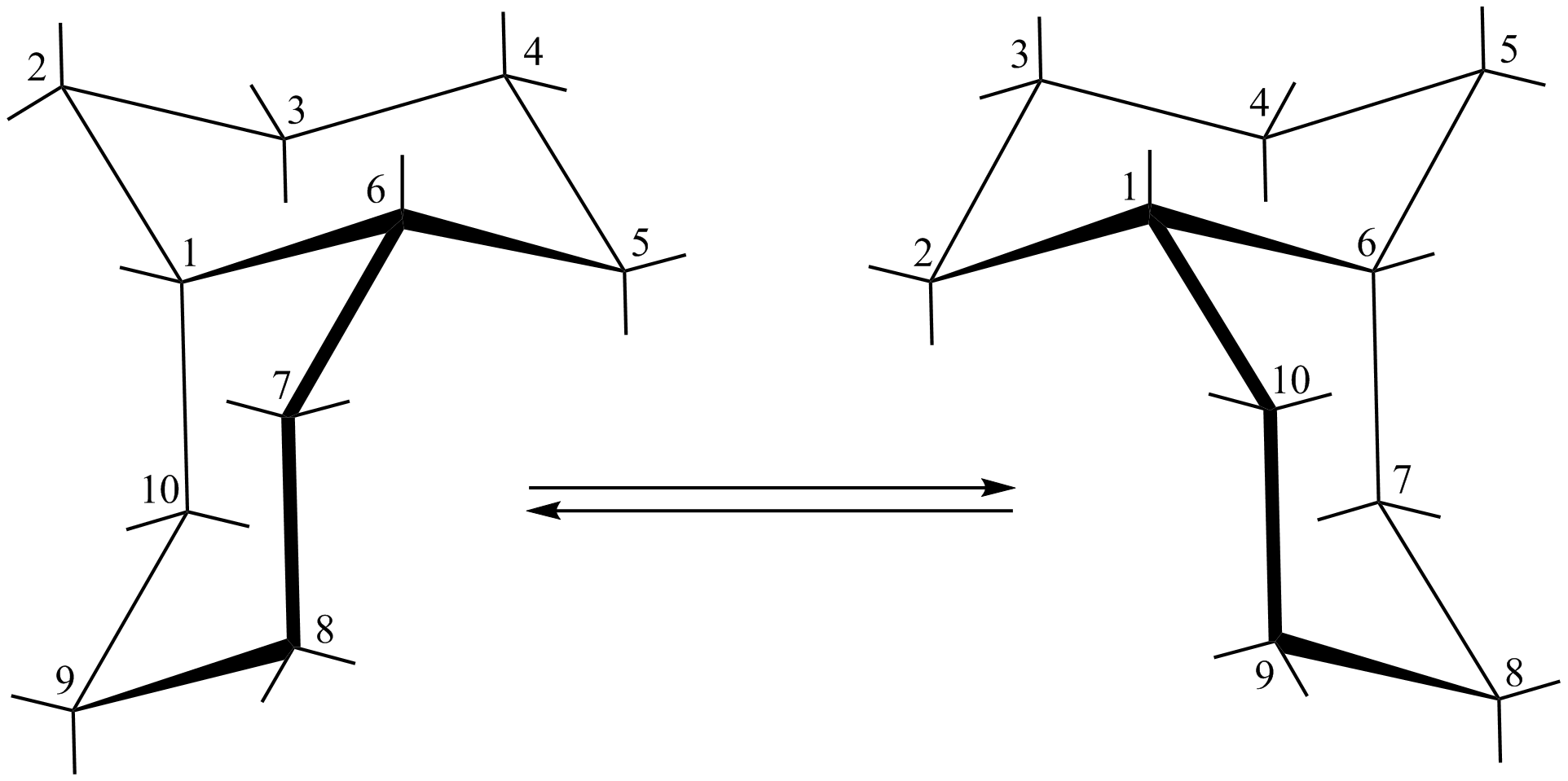 cis-decalina